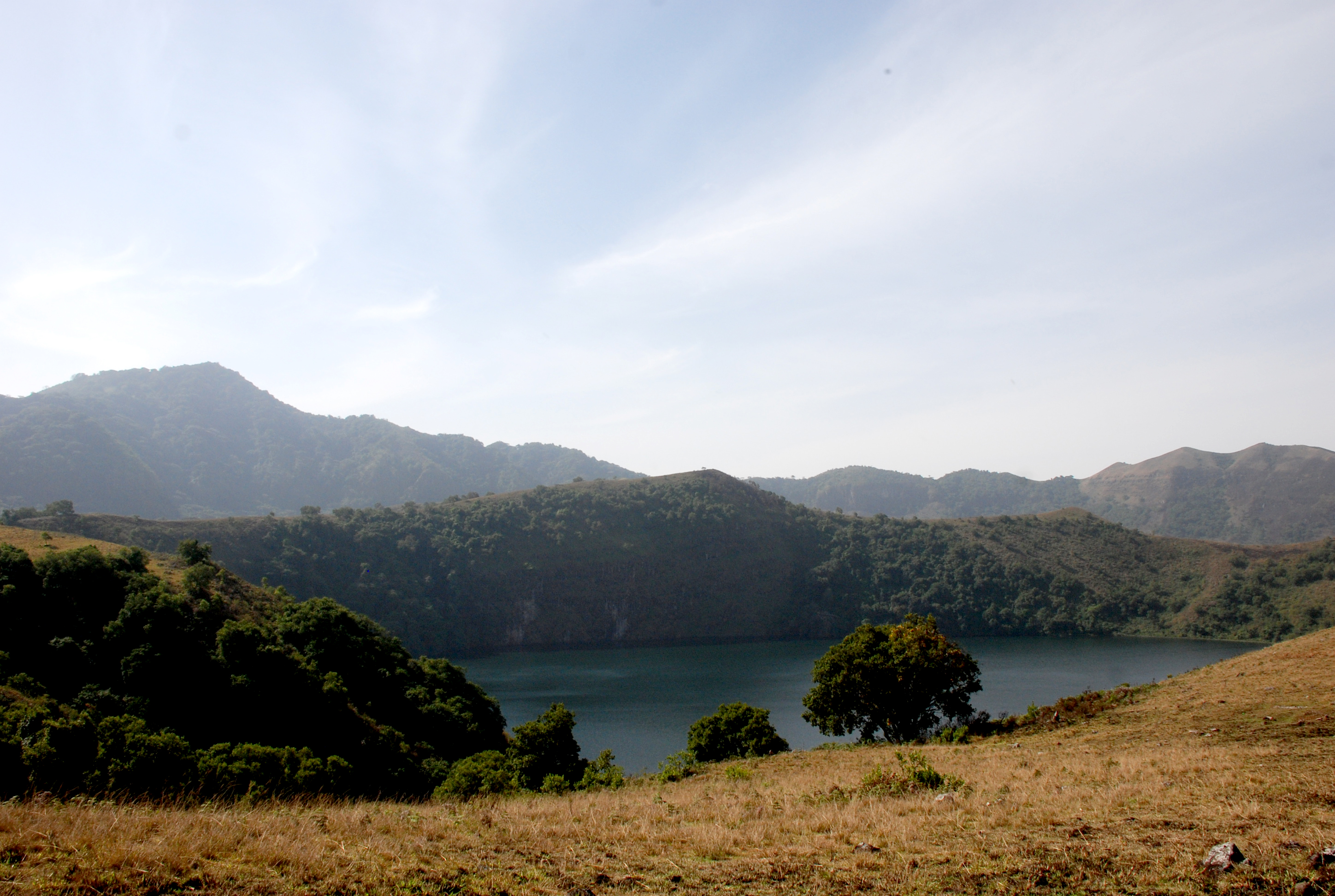 Le lac manengoumba situé sur le Mont Manengoumba